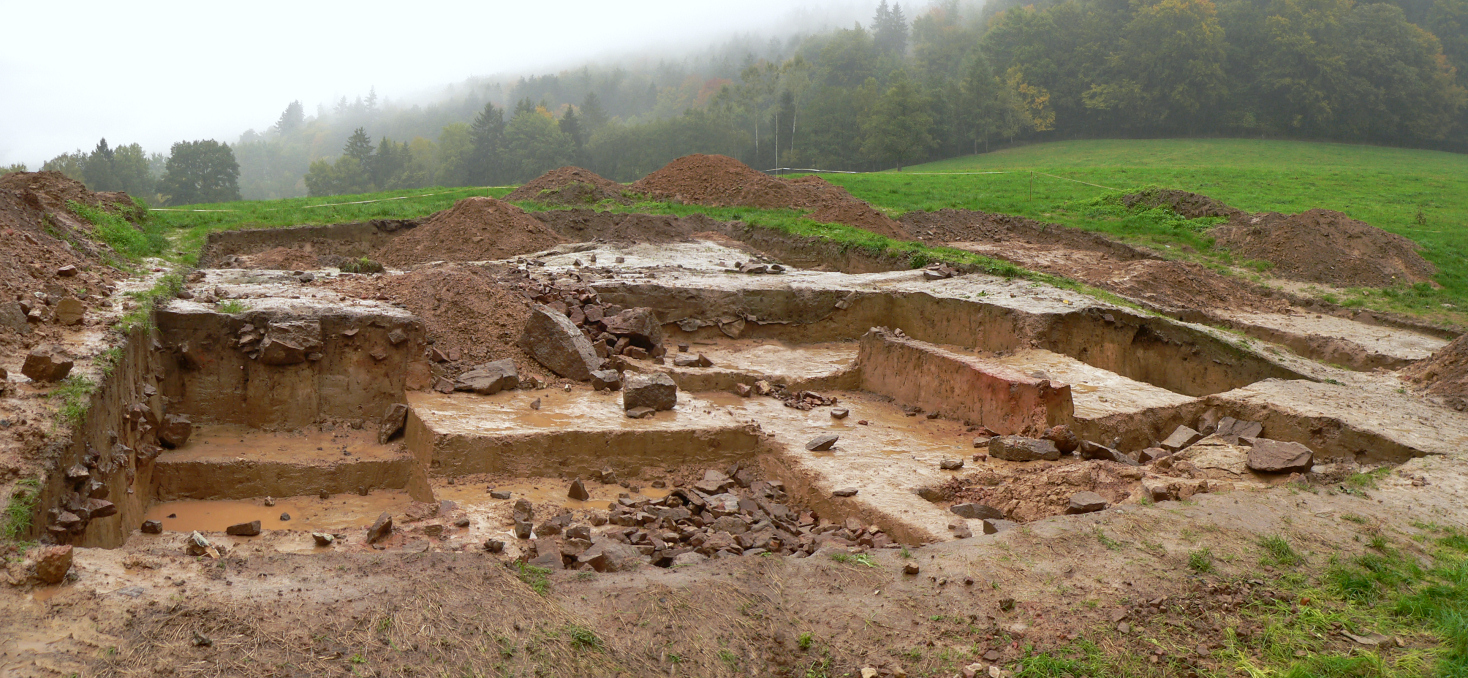 Ausgrabung der Waldglashütte im Reiherbachtal nach Grabungsende